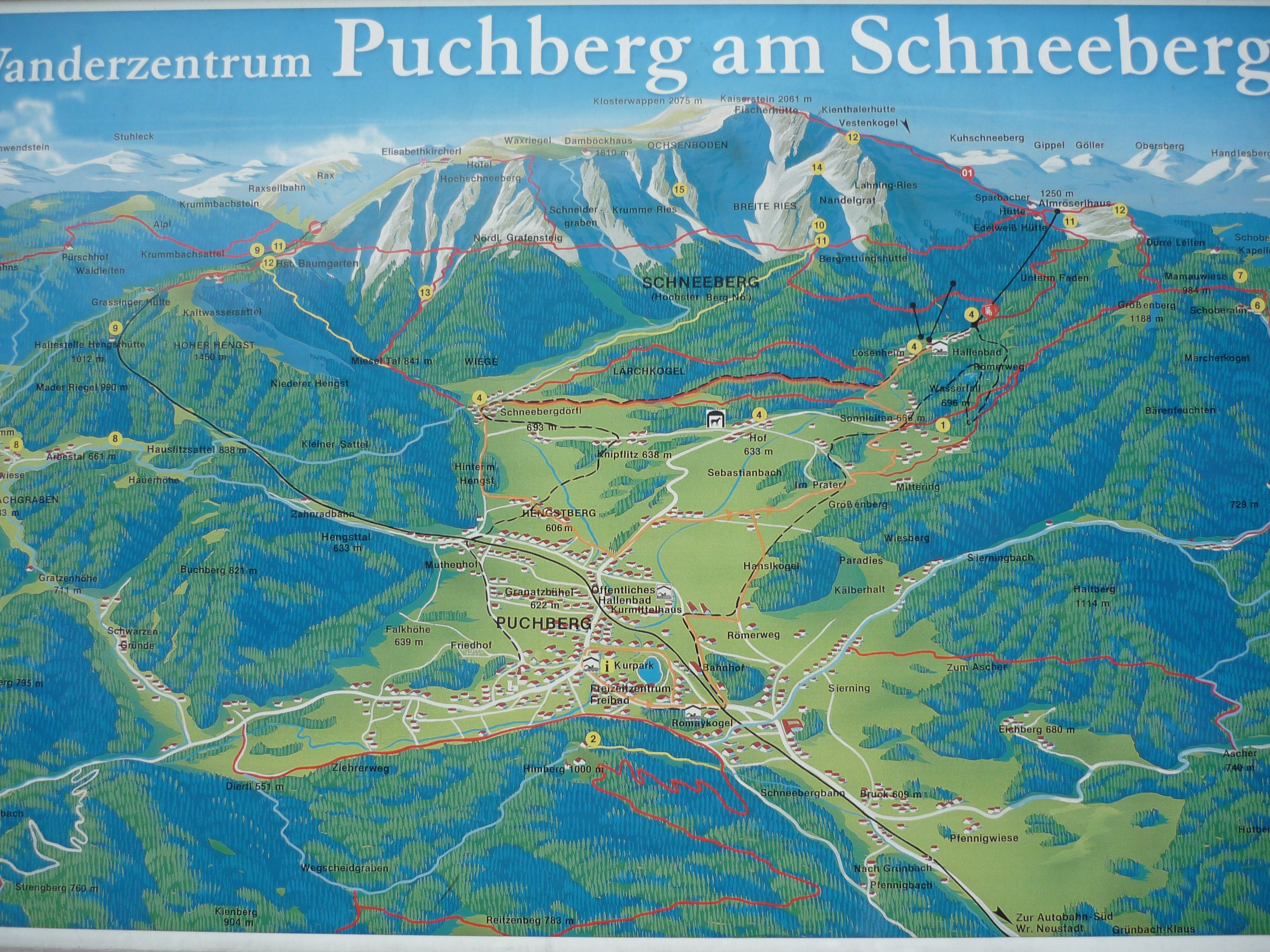 Das Bild zeigt eine Karte von der Marktgemeinde Puchberg am Schneeberg im südlichen Niederösterreich. Zu sehen ist eigentlich der ganze Puchberger Talkessel